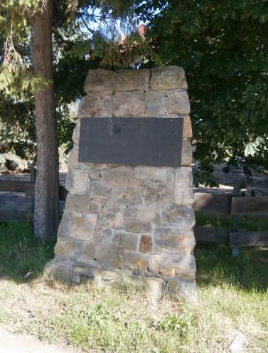 Gedenkstein Gersdorfer Burg